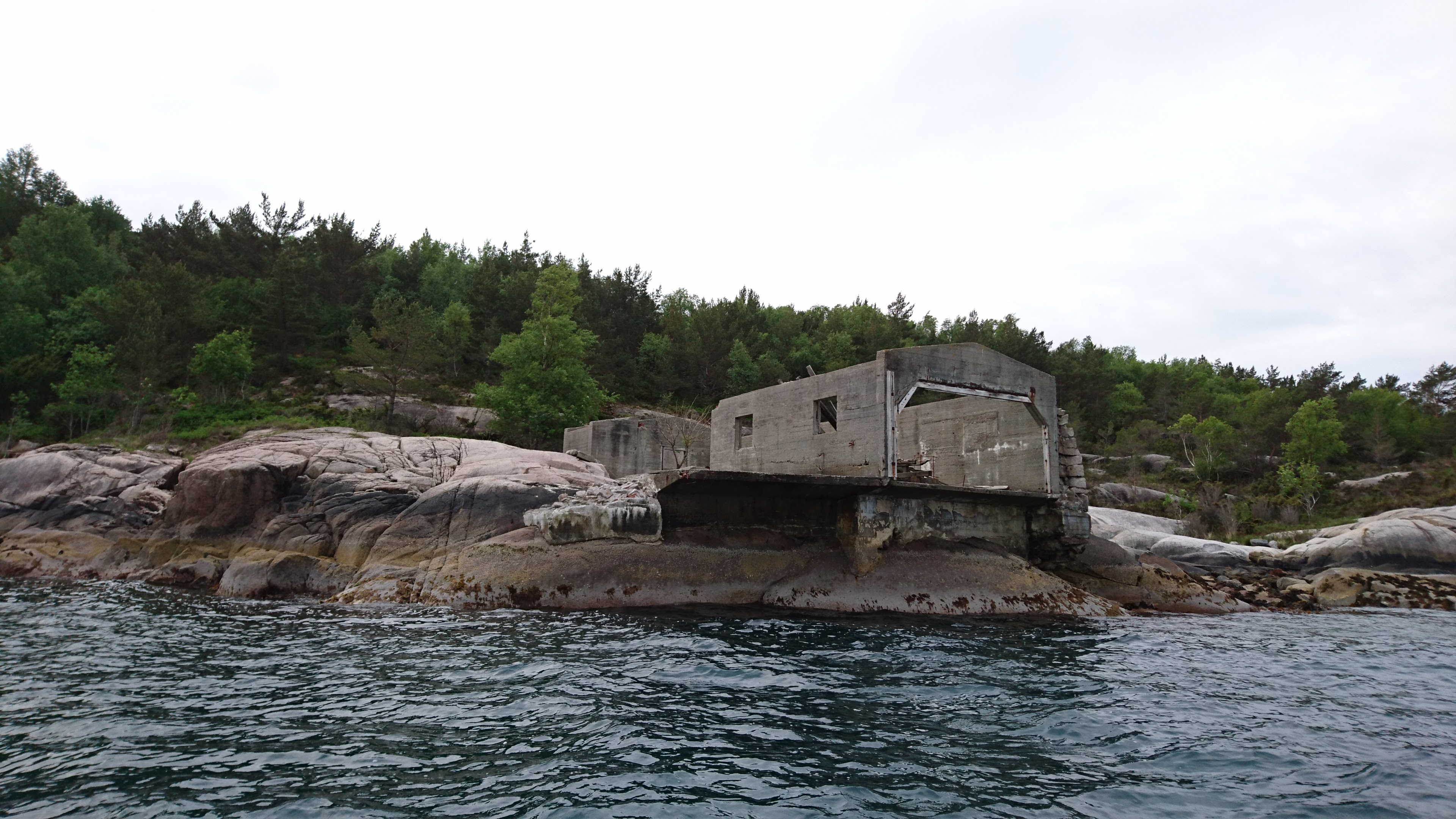 Rutledal Torpedobatteri i Sognefjorden sett fra Nord/Øst